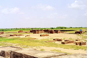 vue du site de lothal, site de la civilisation de l'Indus, été 2003